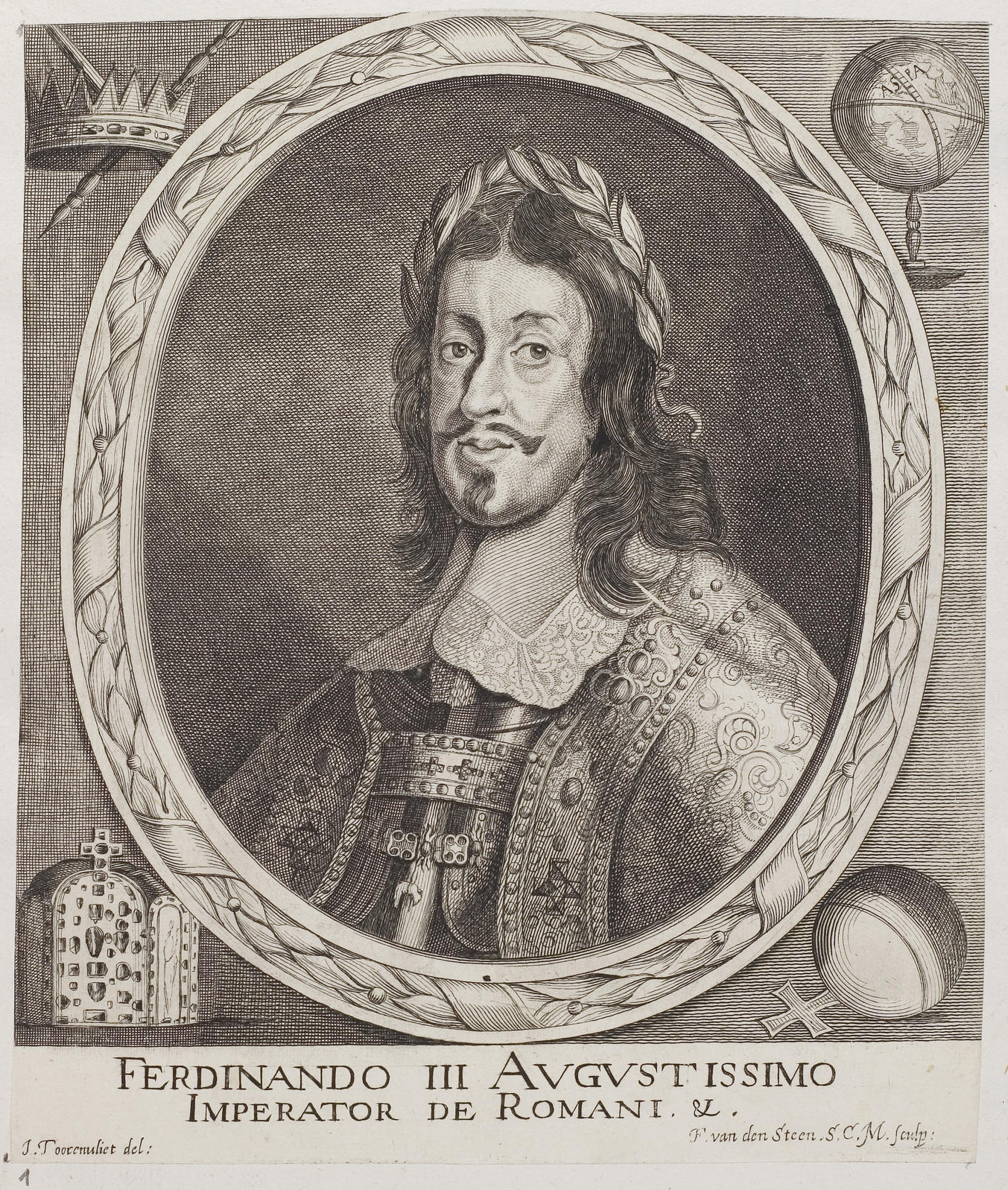 Grafik aus dem Klebeband Nr. 2 der Fürstlich Waldeckschen Hofbibliothek Arolsen Motiv: Ferdinand III.